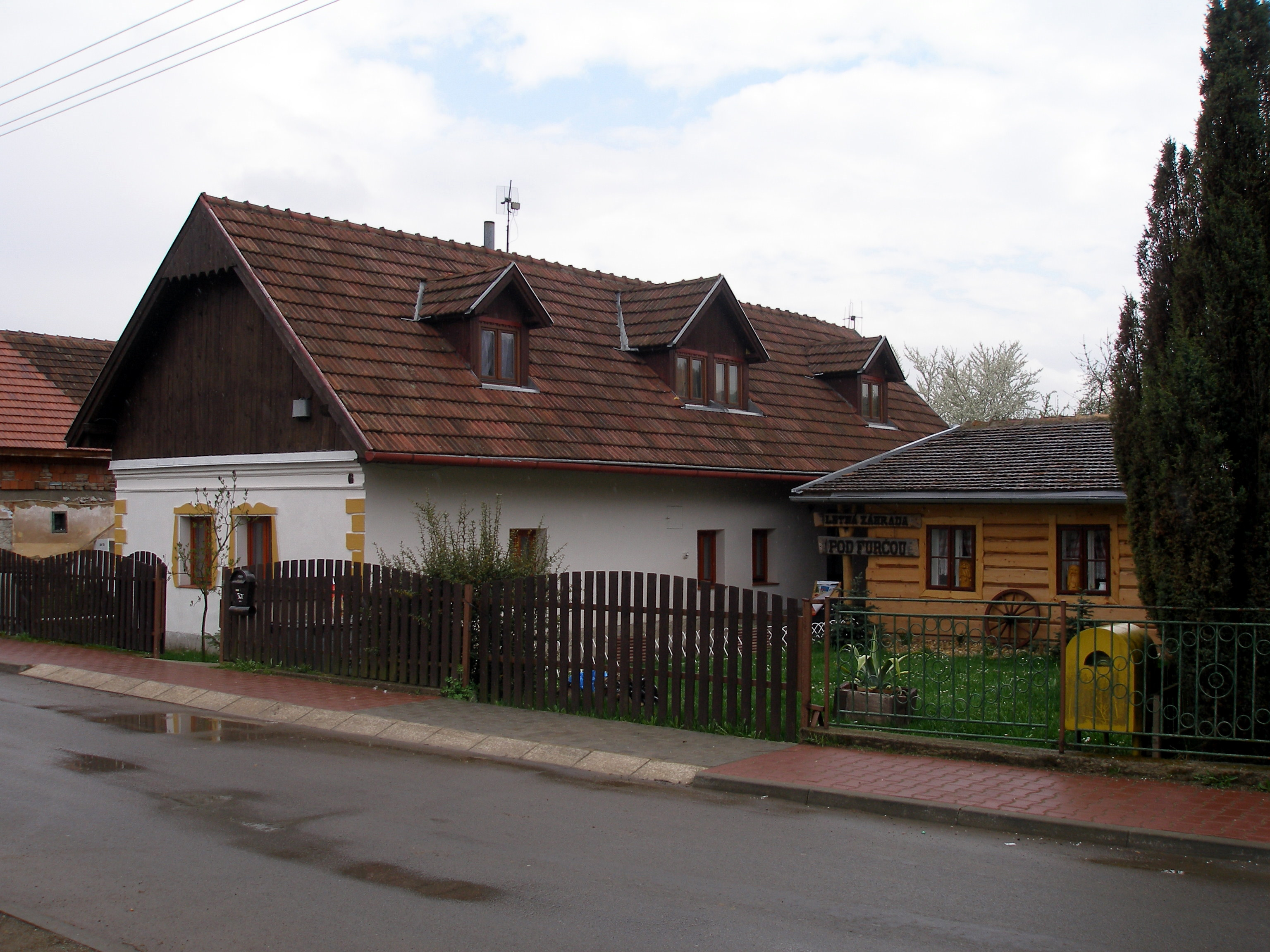 Obec Haniska okres Prešov, región Šariš